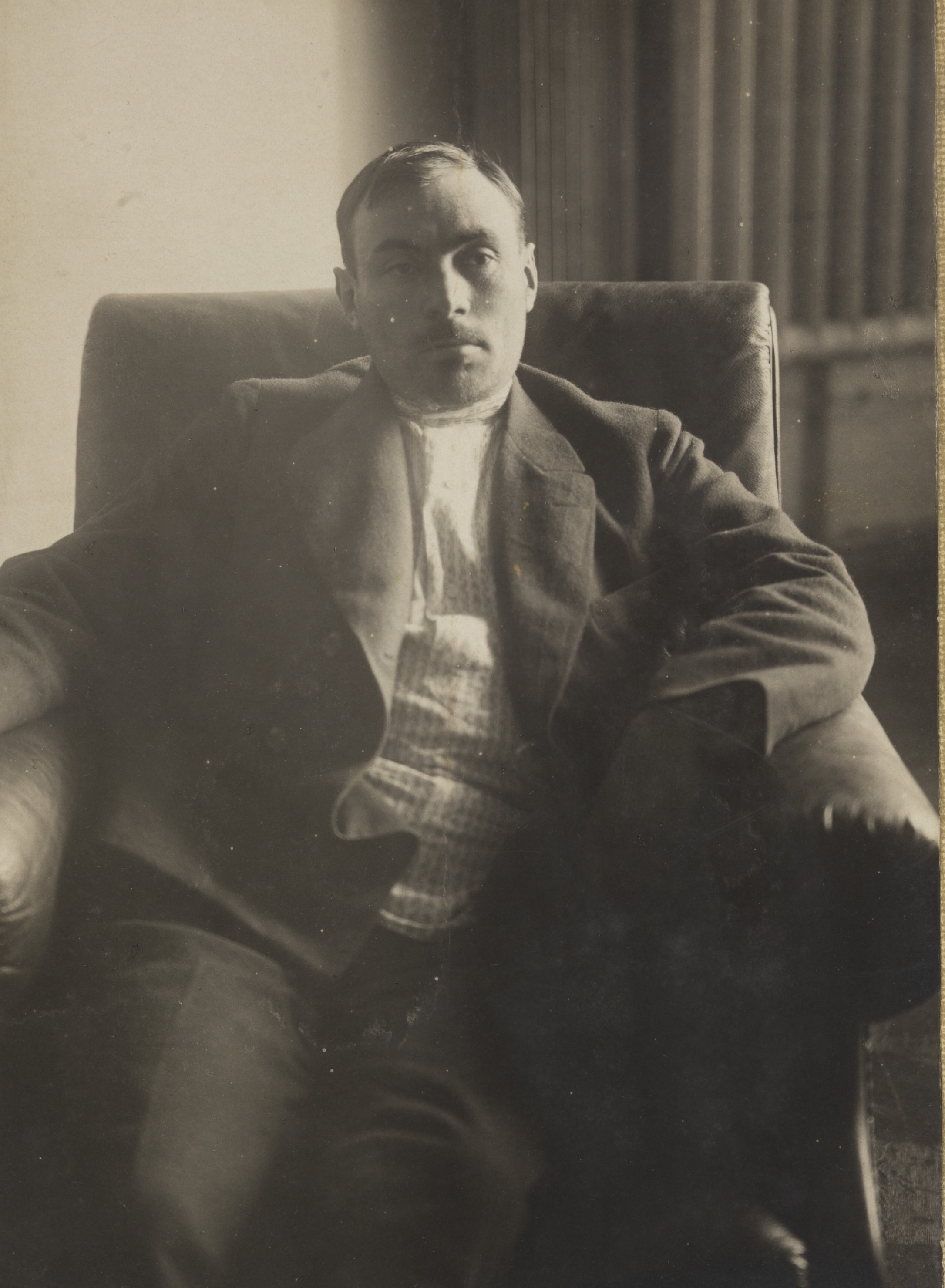 Kalmanovitsj, visefolkekommissær for Matforsyninger. Depicted person: Kalmanovitsj Depicted place: Russia